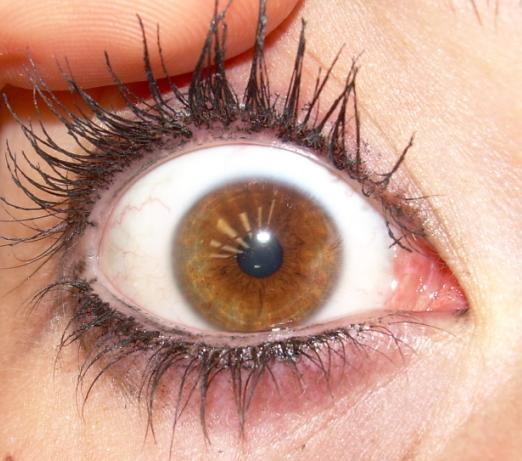 a hazel eye